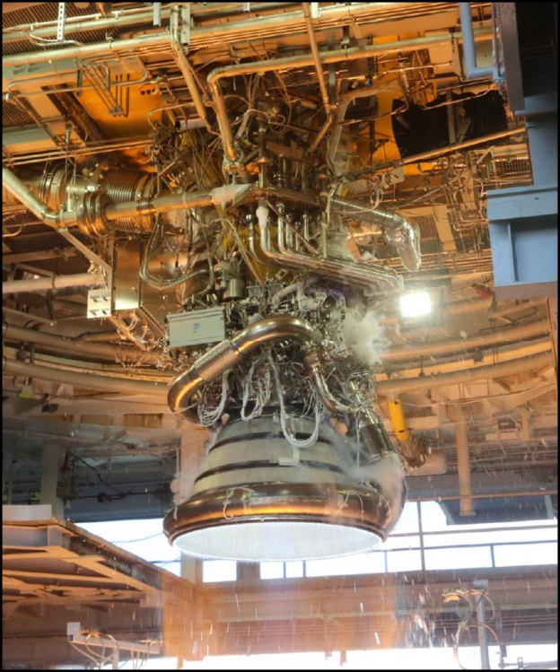 Silnik rakietowy J-2X podczas pracy.